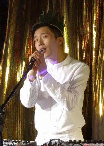 2016년 9월 24일 무지개예술로 축제에서 플래시 플러드 달링스.